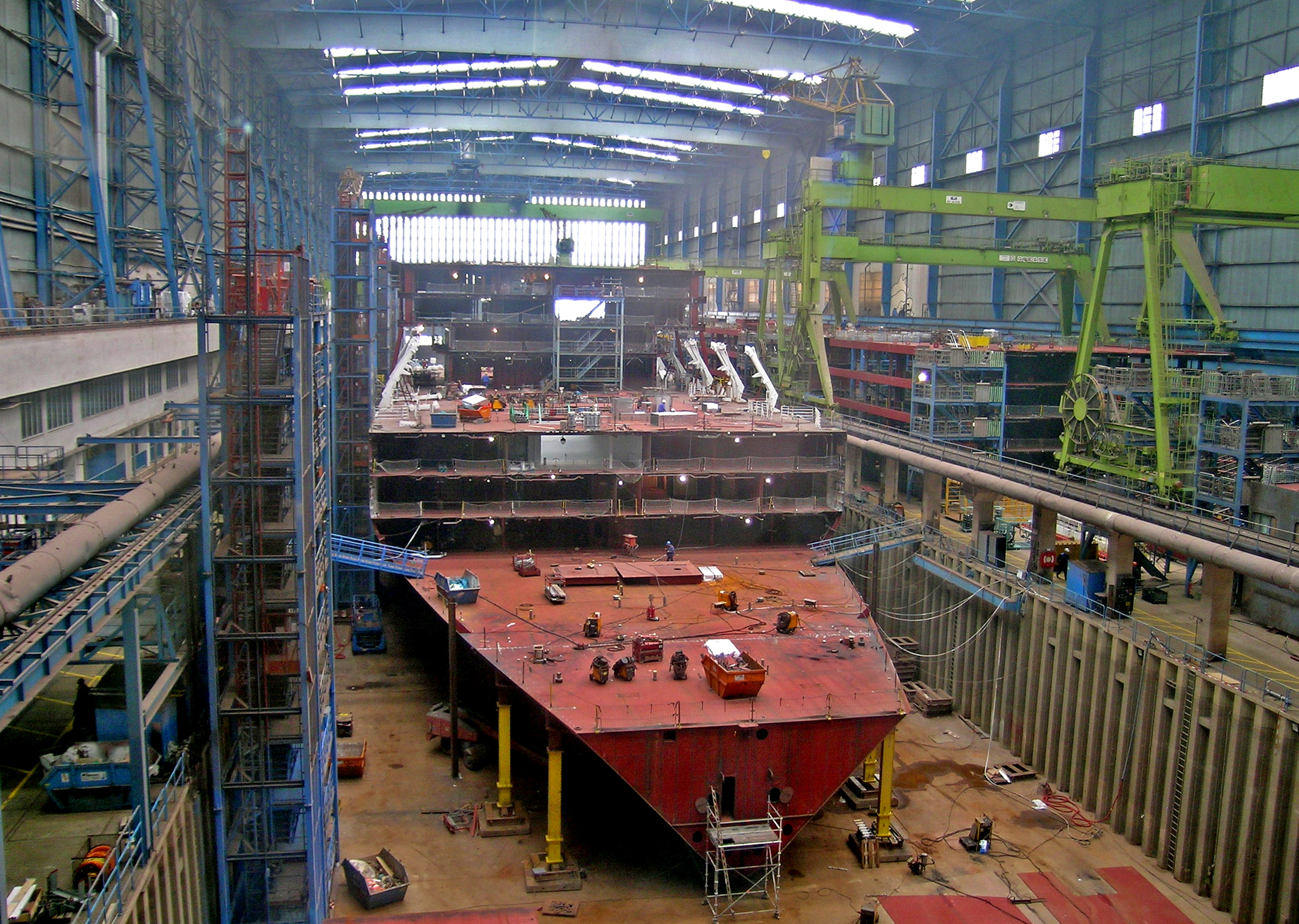 AIDAdiva im April 2006 im Dock der Meyerwerft Papenburg